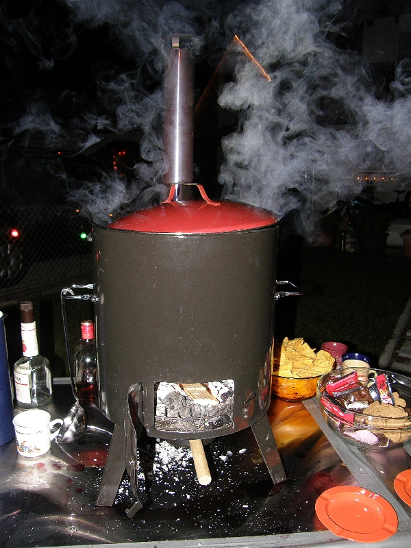 Ein Glühweinhofen